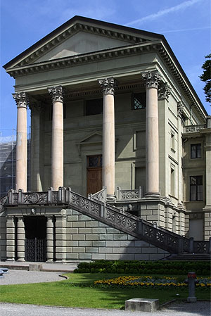 Stadthaus in Winterthur (Nr. 03.1-5471)